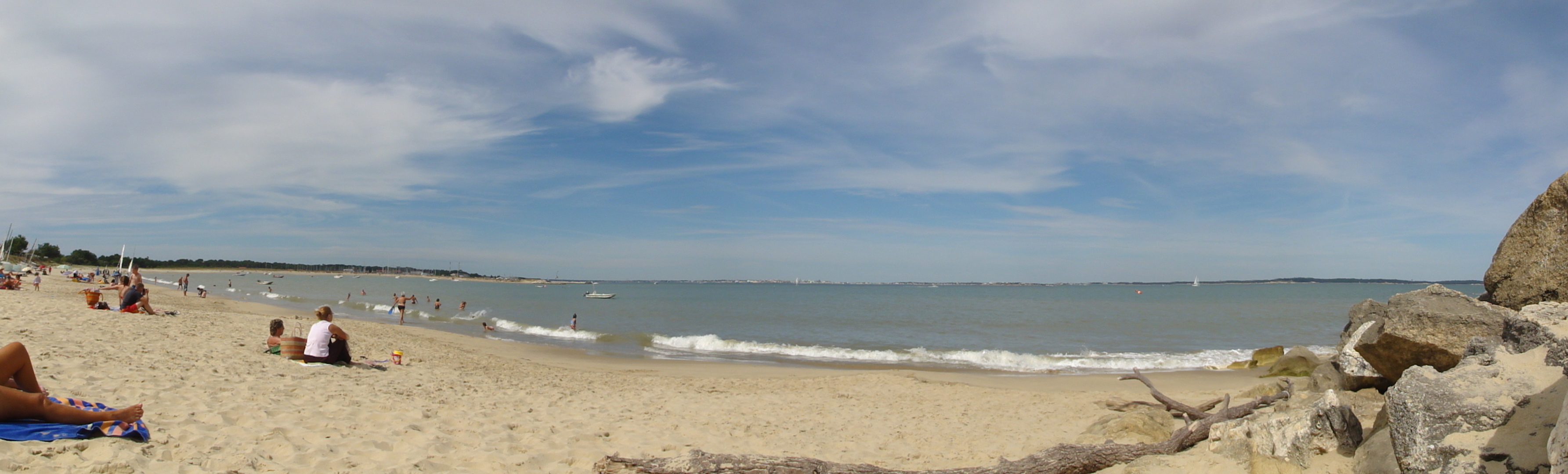 plage de Le Verdon-sur-Mer